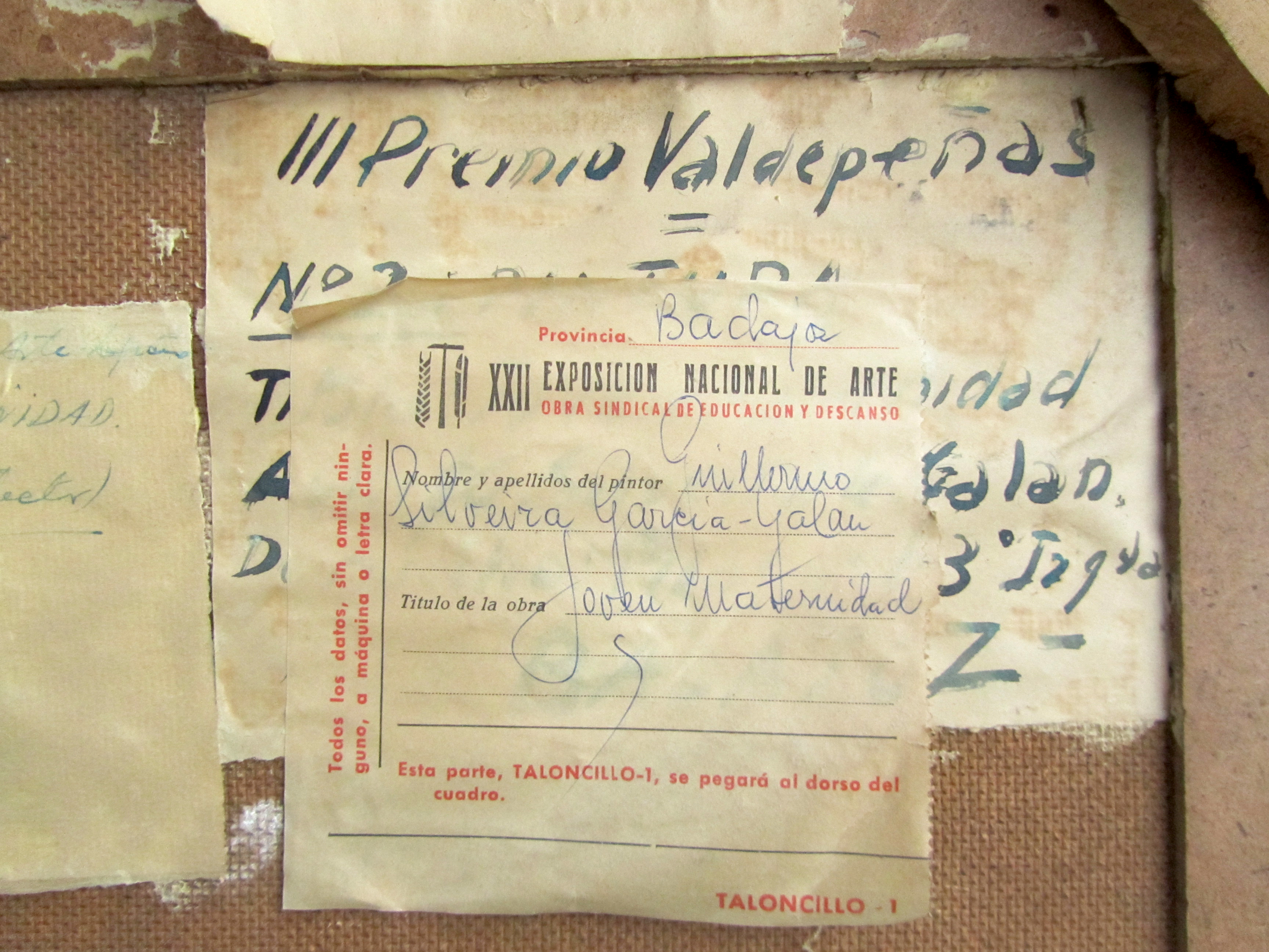 Joven maternidad, 1963. Óleo sobre tablex, 62 x 55 cm. Presentada al "III Premio Valdepeñas y XXIV Exposición Manchega de Artes Plásticas". Valdepeñas (Ciudad Real), septiembre de 1963 y "XXII Exposición Nacional de Arte de la Obra Sindical de Educación y Descanso". Palacio de Espartero. Logroño, junio de 1964.